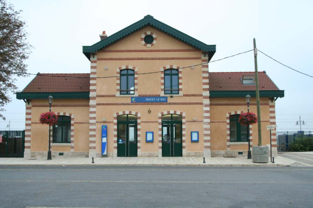 Gare de Noisy-le-Roi - Yvelines (France)